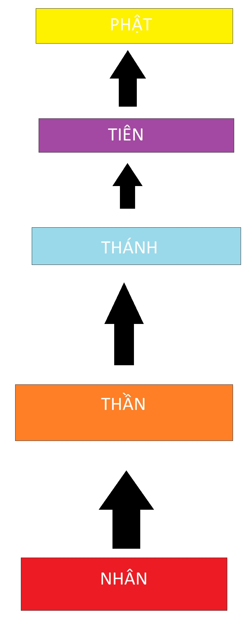 tôi tự thiết kế